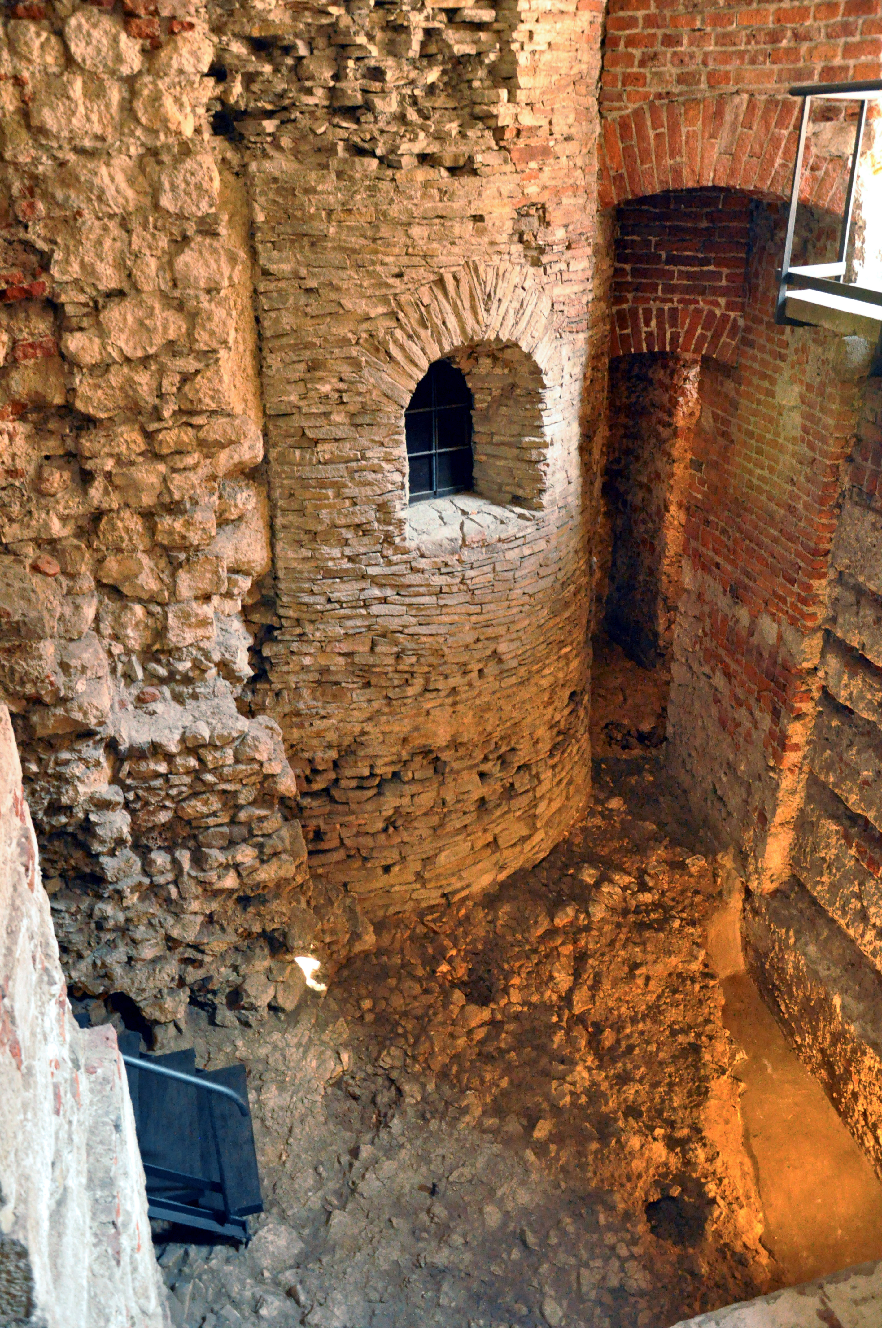 Rotunda Najświętszej Marii Panny na Wawelu